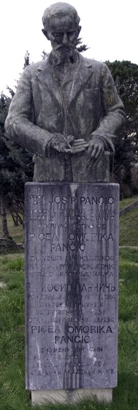 Josip Pančić, Crikvenica, Croatia